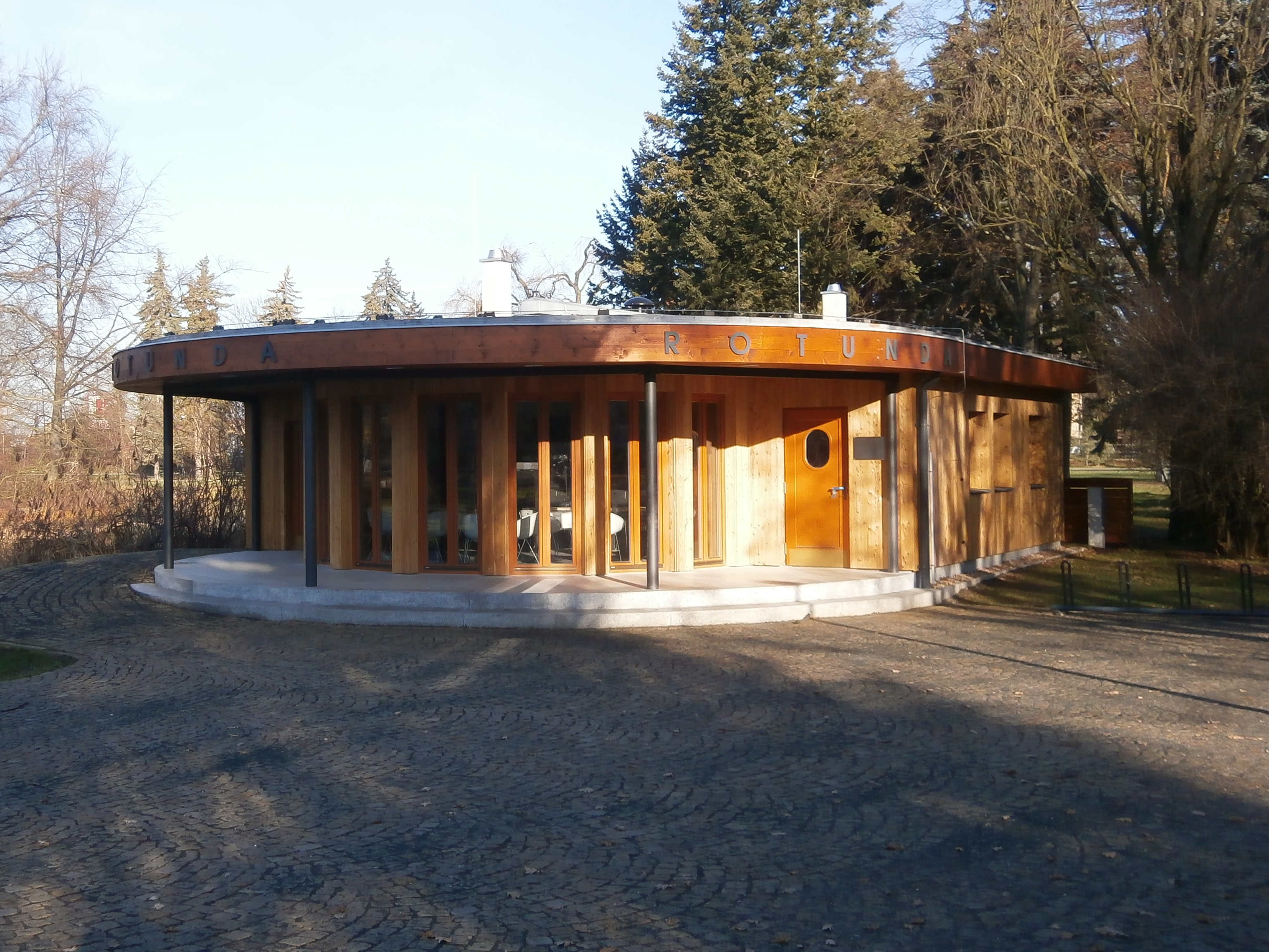 Rotunda v Šimkových sadech (Hradec Králové)